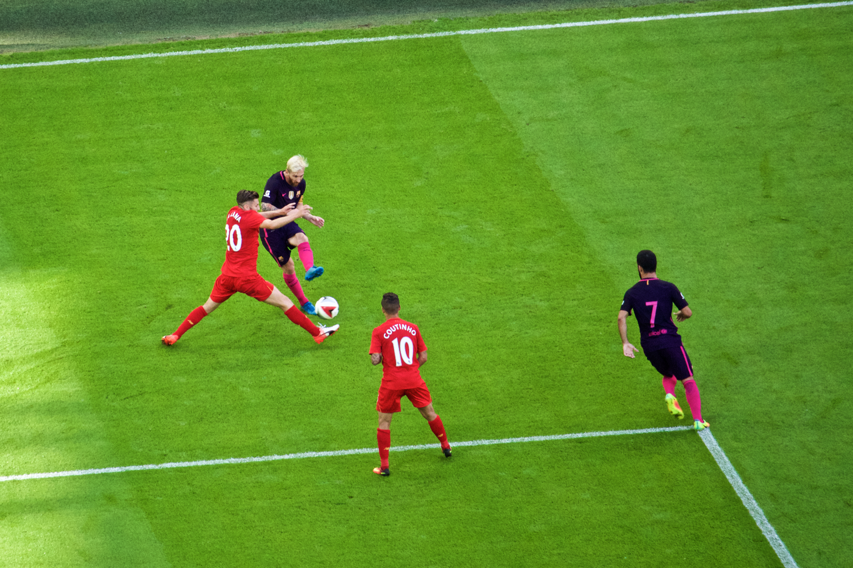 Turan 2016-17 sezonu öncesinde